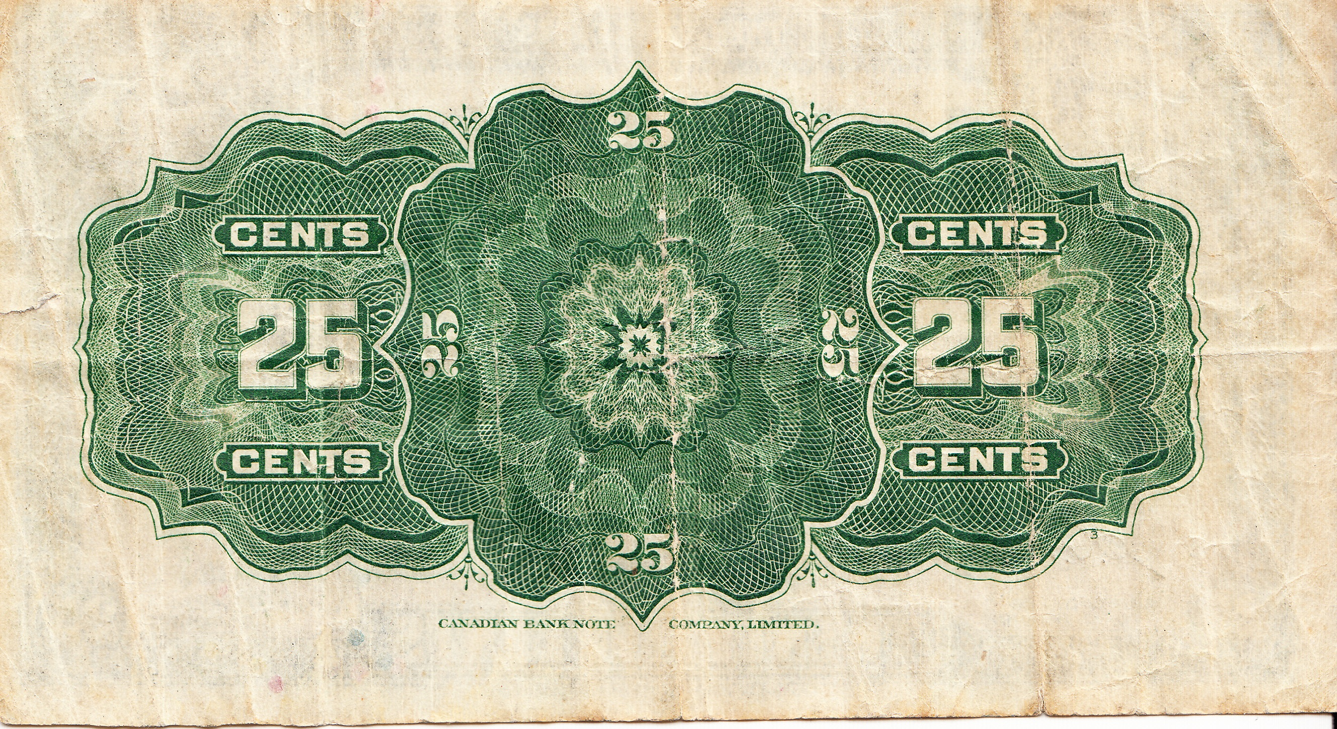 Billet canadien de 0,25$, troisième émission (1923) (revers)